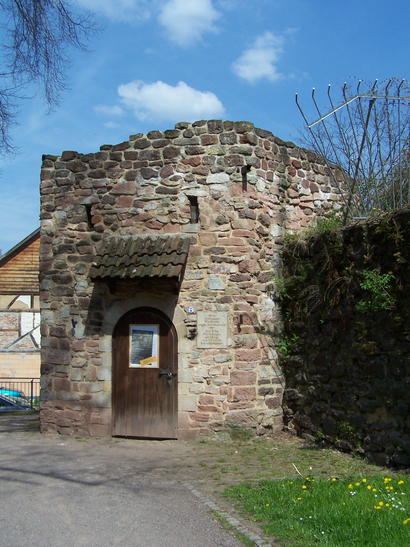 Eisenach, Storchenturm mit Kerker-Theater